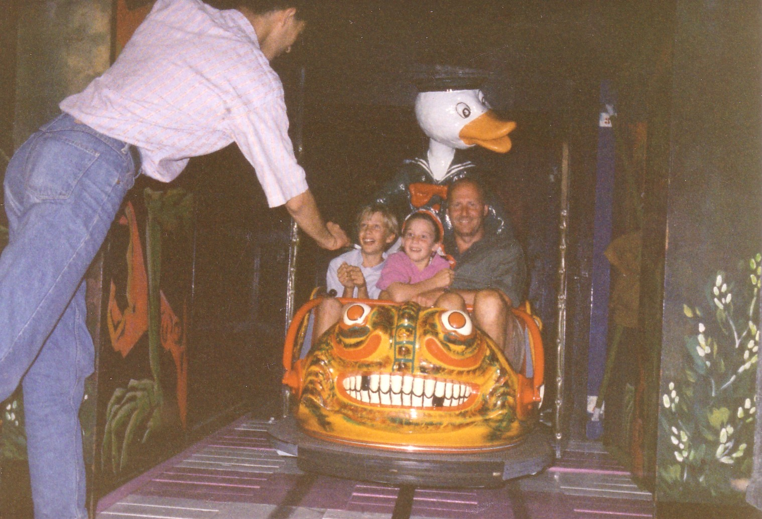 Sortie du trn fantôme - Photo prise à Bruxelles en 1992